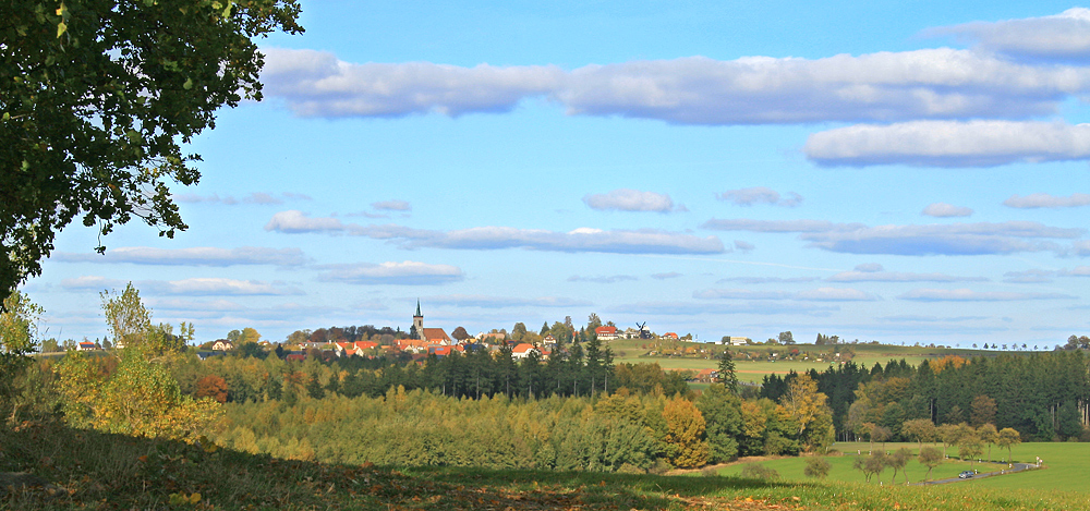 Kottmarsdorf von Ebersbach aus gesehen